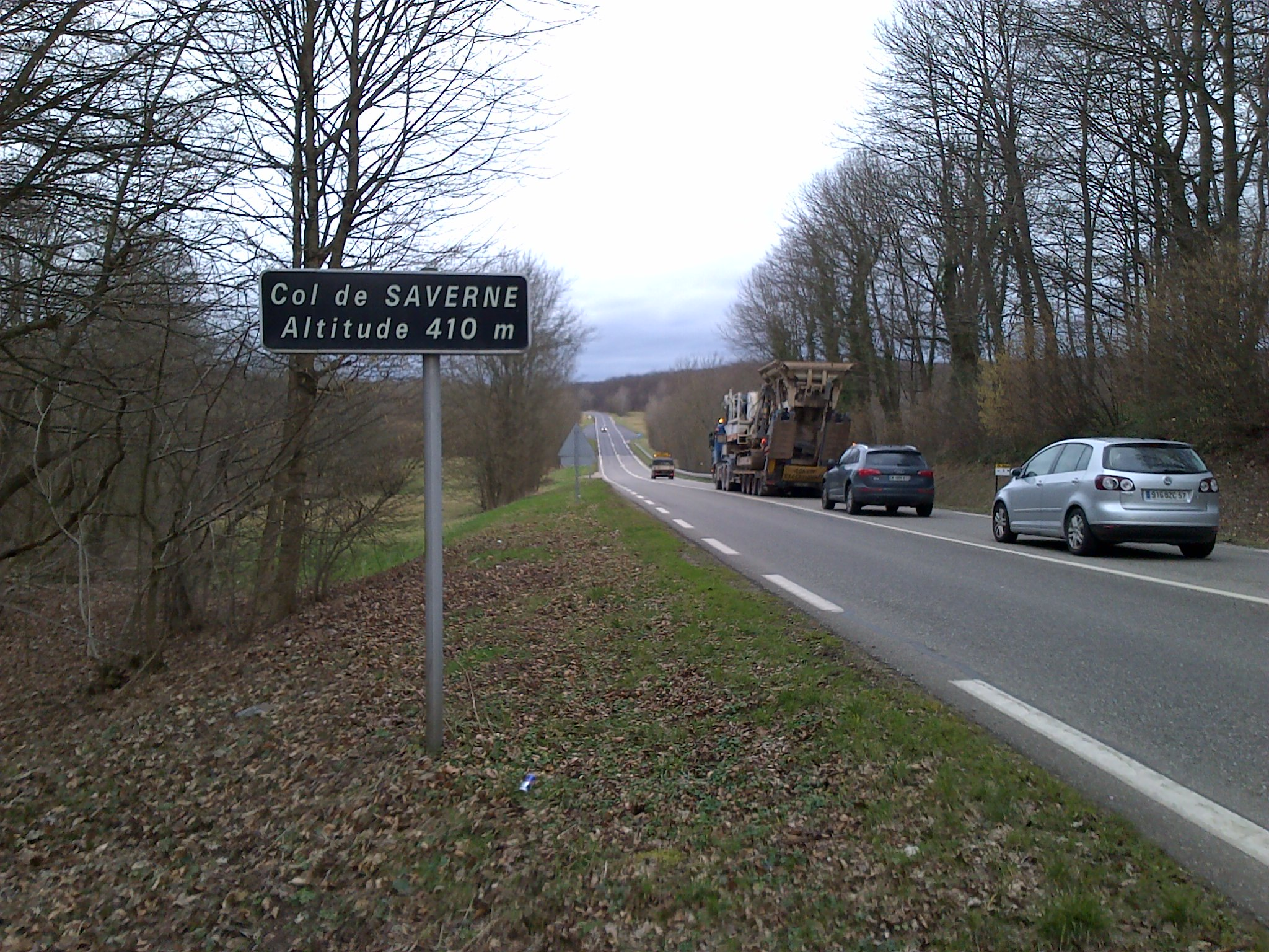 Col de Saverne - panneau